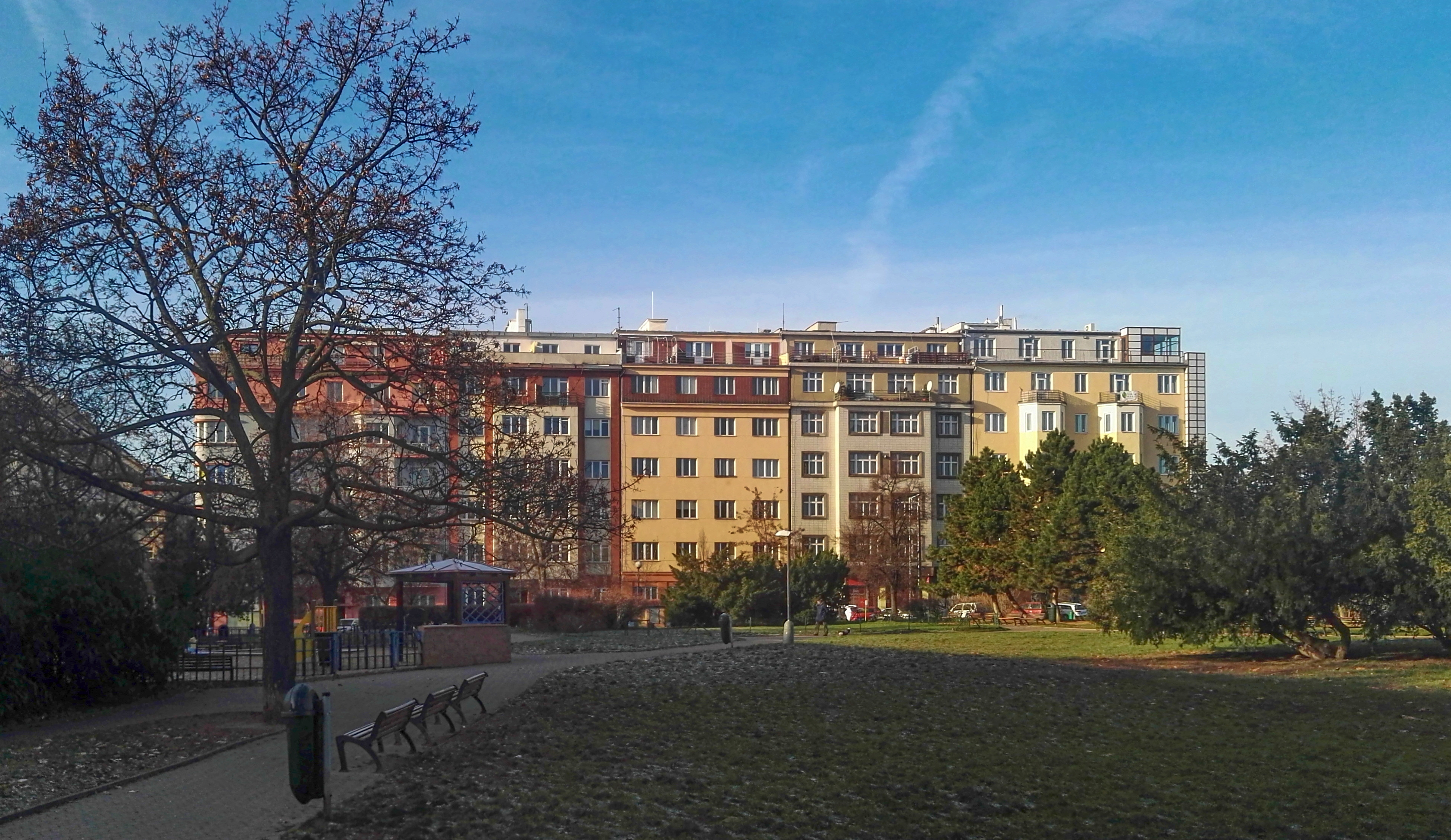 Náměstí Jiřího z Lobkovic, pohled přes park k domům na západní straně náměstí